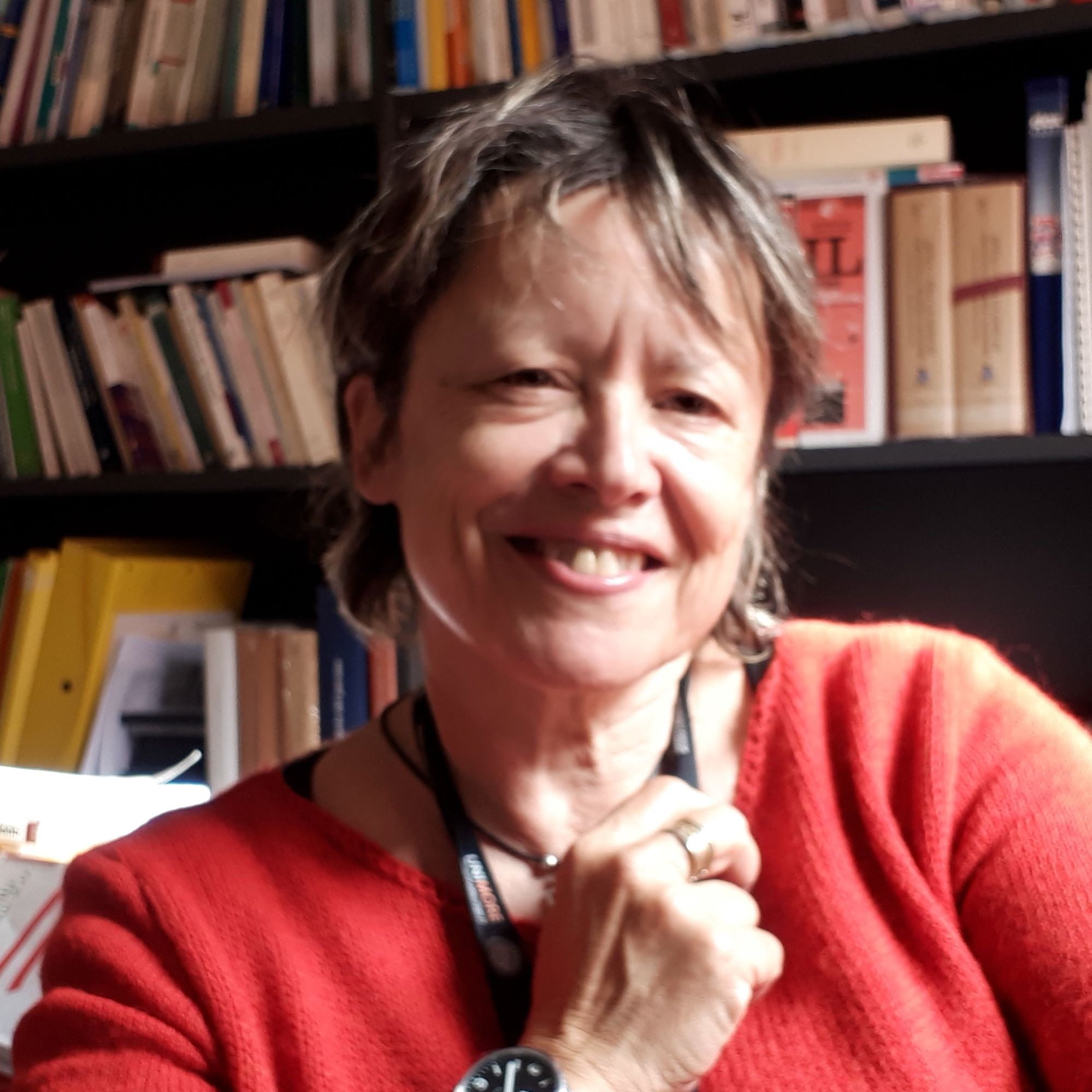 Cecilia Robustelli